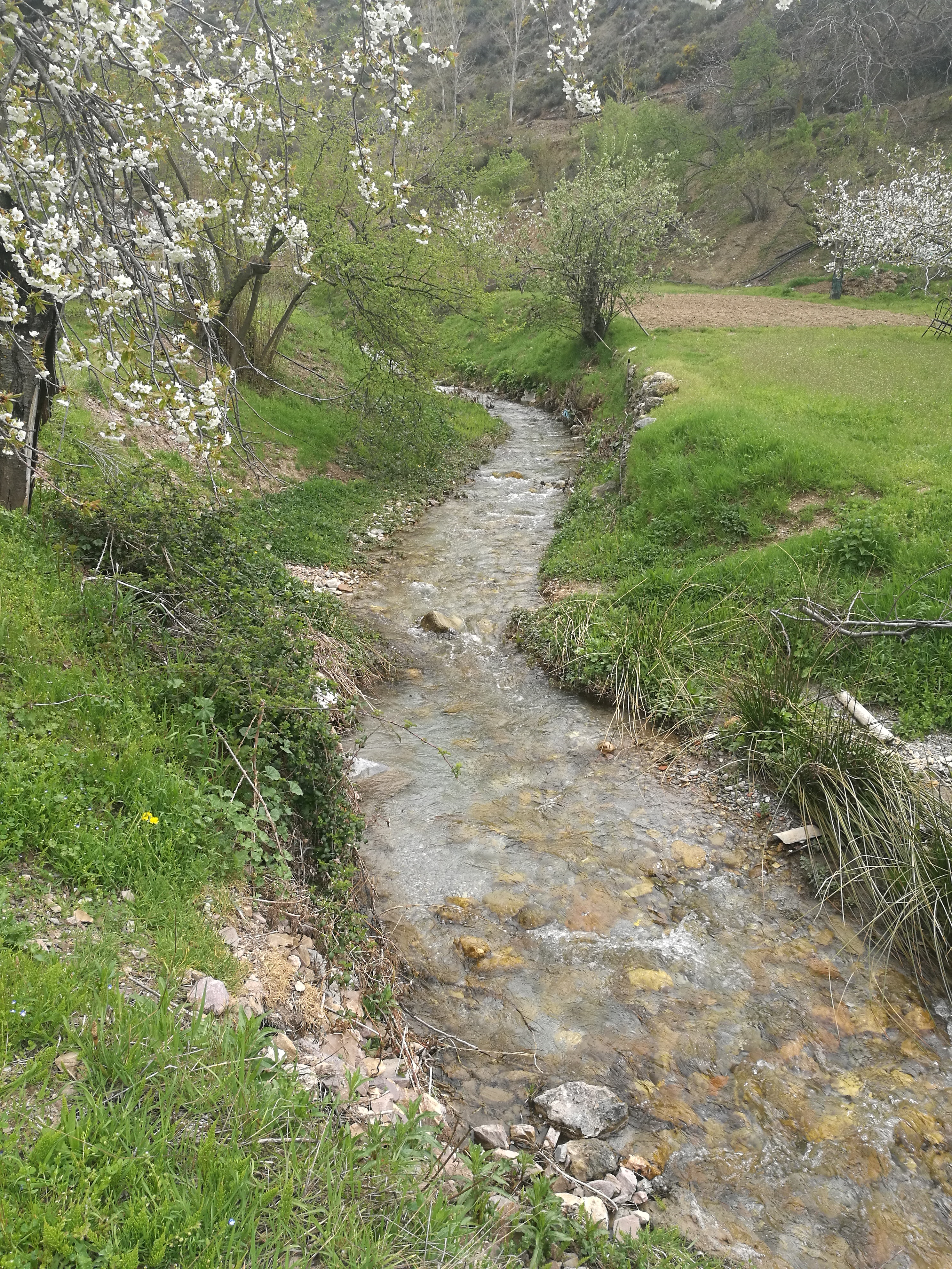 Imagen del rio a su paso por el cortijo tintin